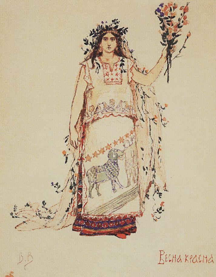 Весна-Красна